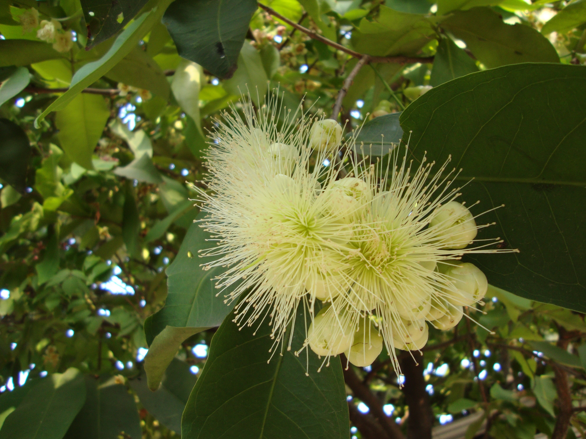 Syzygium samarangense (Blume) Merr. & L.M.Perry, 1938